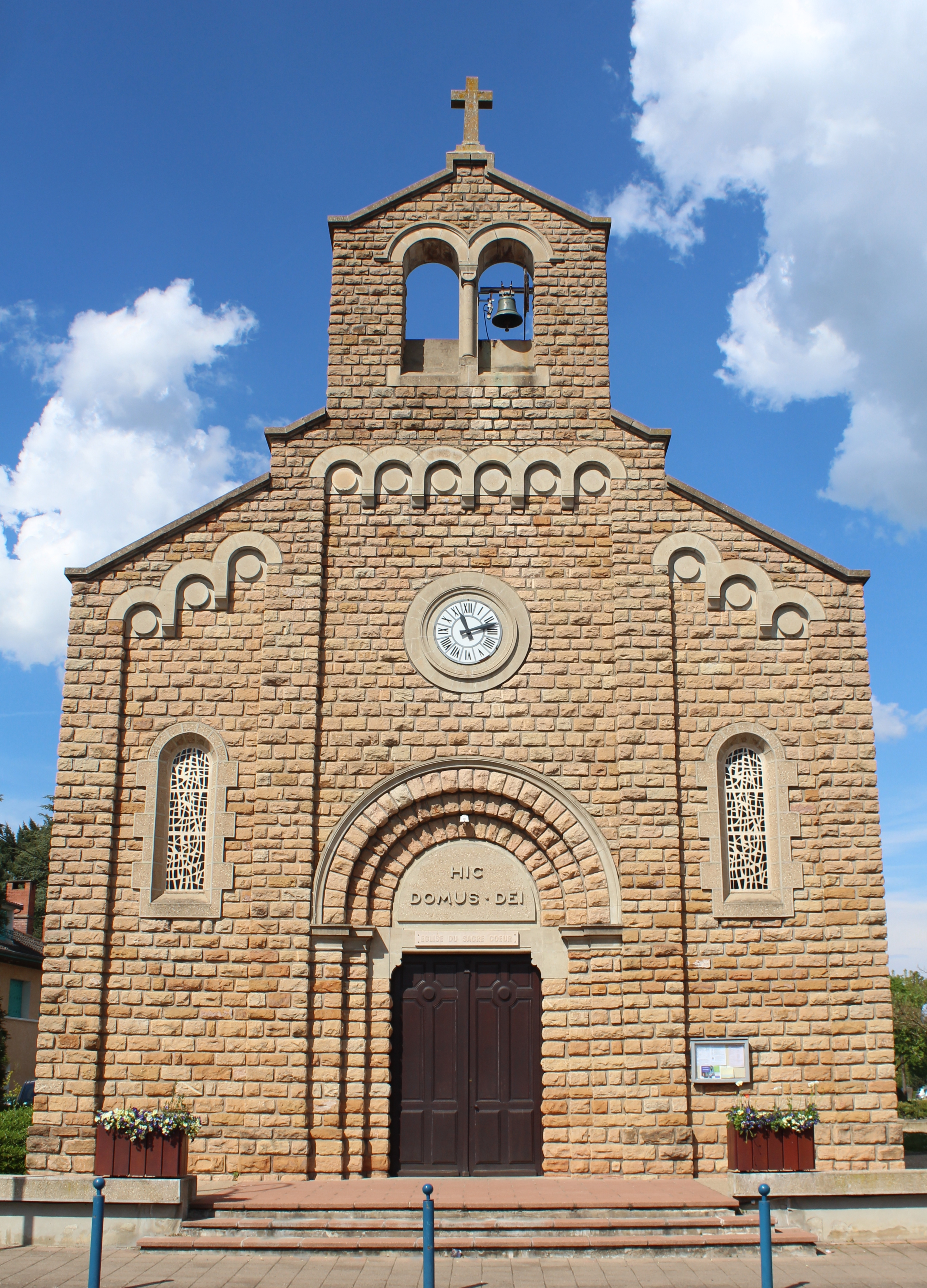 Église du Sacré-Cœur de la Coupée, Charnay-lès-Mâcon.